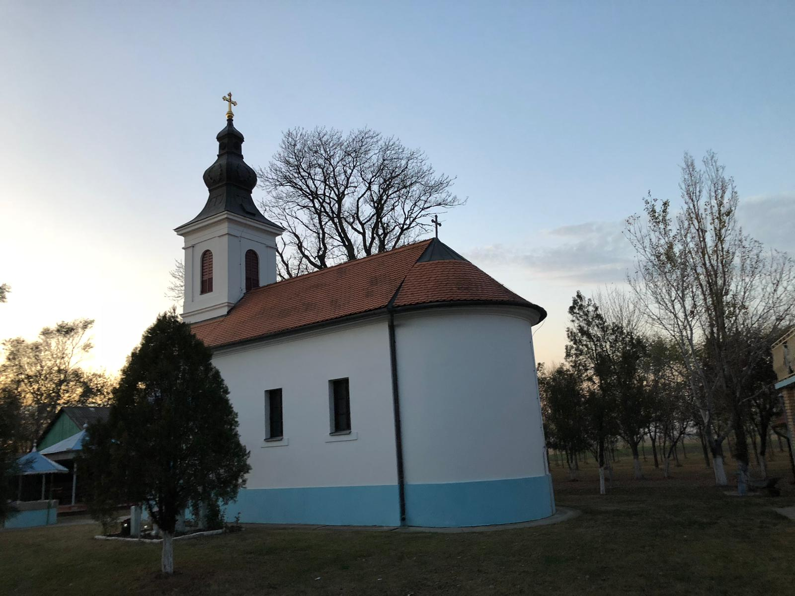 Crkva posvećena presvetoj Bogorodici, poznatija kao Vodica, nedaleko od Ruskog Krstura